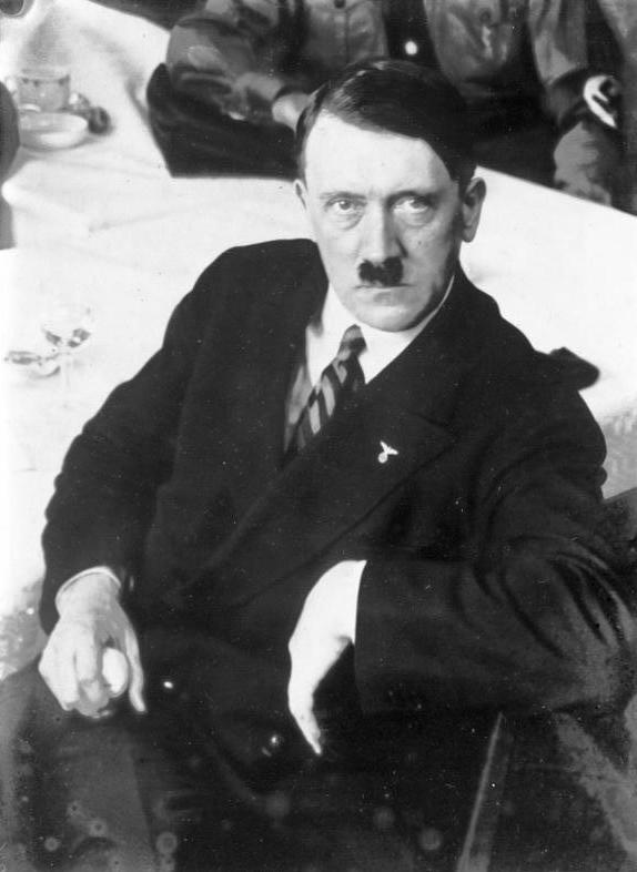 Zu den Verhandlungen über die Verlängerung der Amtszeit des Reichspräsidenten von Hindenburg! Der Führer der Nationalsozialisten Adolf Hitler, welcher mit Reichskanzler Dr. Brüning wichtige Besprechungen über die Amtszeitverlängerung des Reichspräsidenten in Berlin führt.